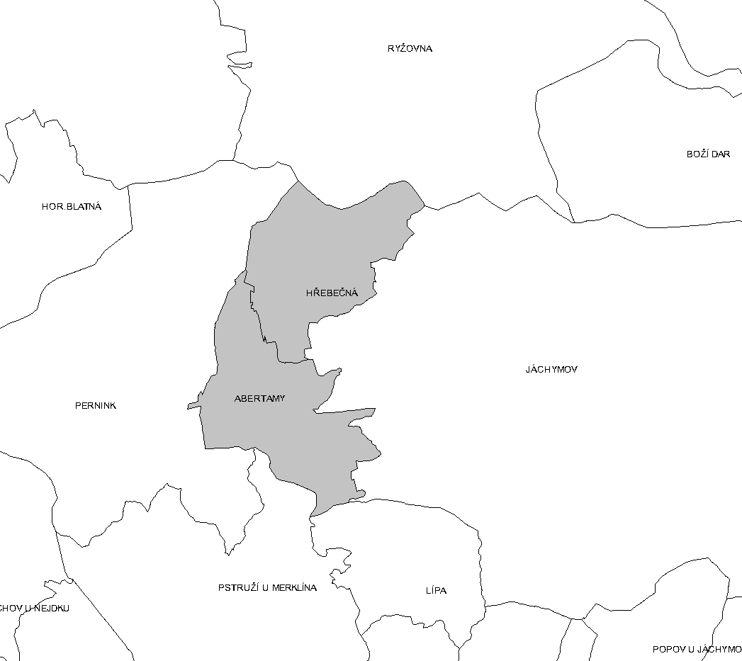 Katastrální členění Abertam